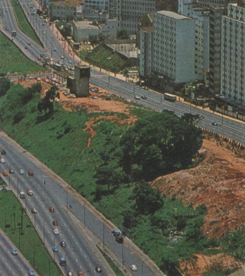 Vista da área do futuro Centro Cultural São Paulo em meados de 1978. Em destaque no terreno vazio, a torre de ventilação e os acessos da estação Vergueiro do Metrô de São Paulo